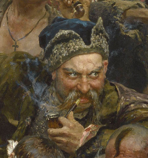 Ausschnitt aus dem Gemälde Die Saporoger Kosaken schreiben dem türkischen Sultan einen Brief